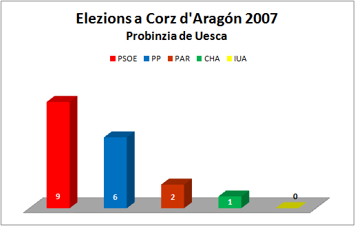 Aragonés: Grafico d'as elezions a Corz d'Aragón de la añada 2007